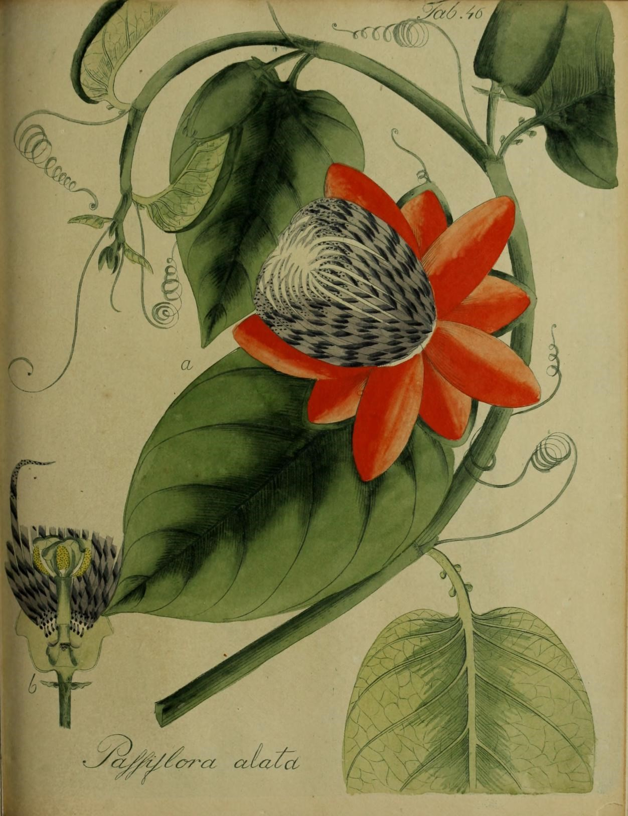 Collectio plantarum tam exoticarum, quam indigenarum, cum delineatione, descriptione culturaque earum /